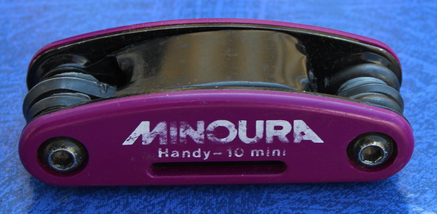 Fahrradwerkzeug, geschlossen